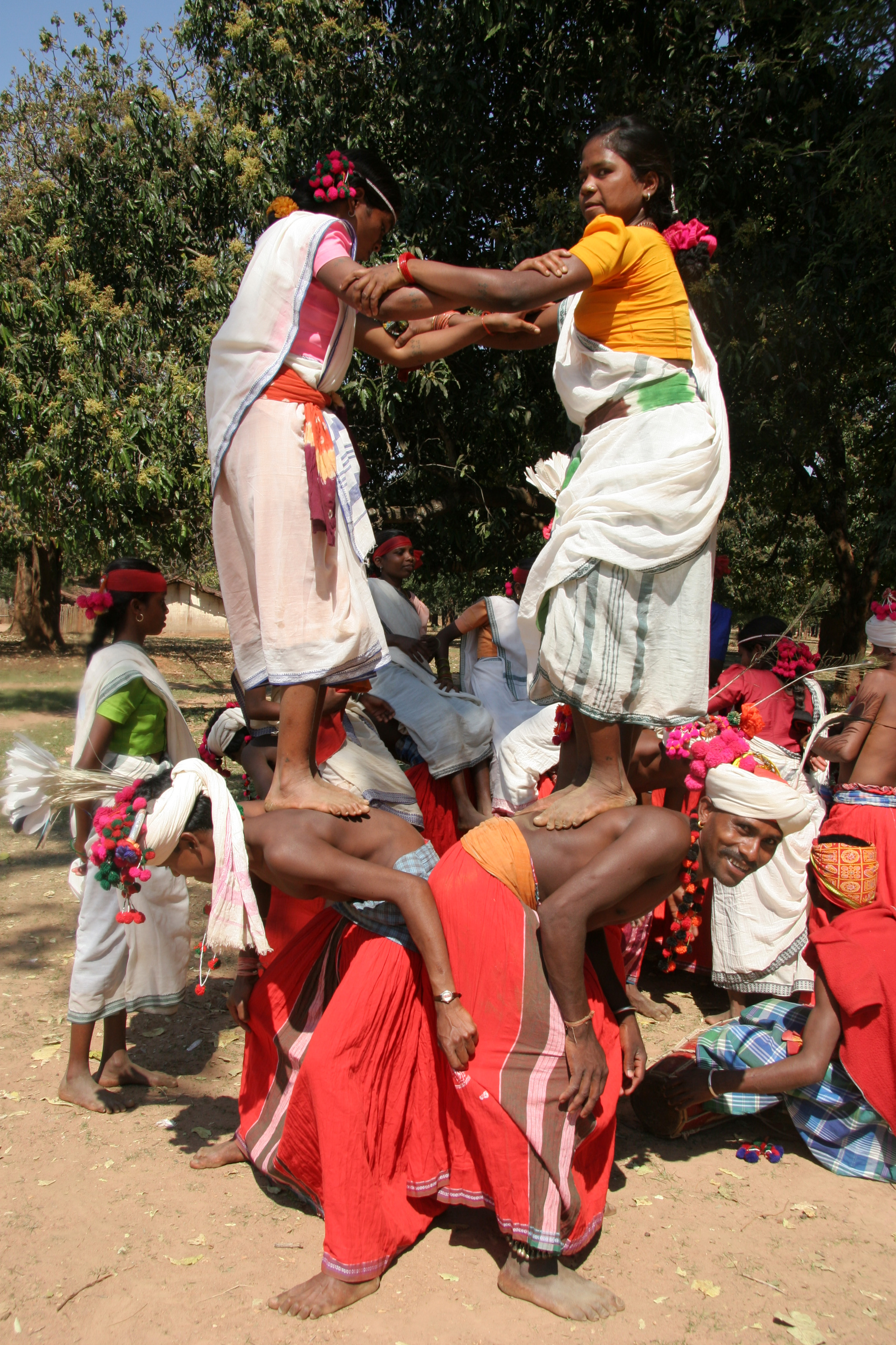 inde bastar danse dans un village muria